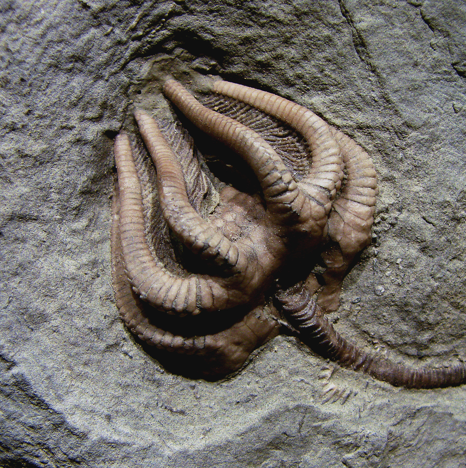 Agaricocrinus americanus, crinoïde, carbonifère, Provenance: Indiana.